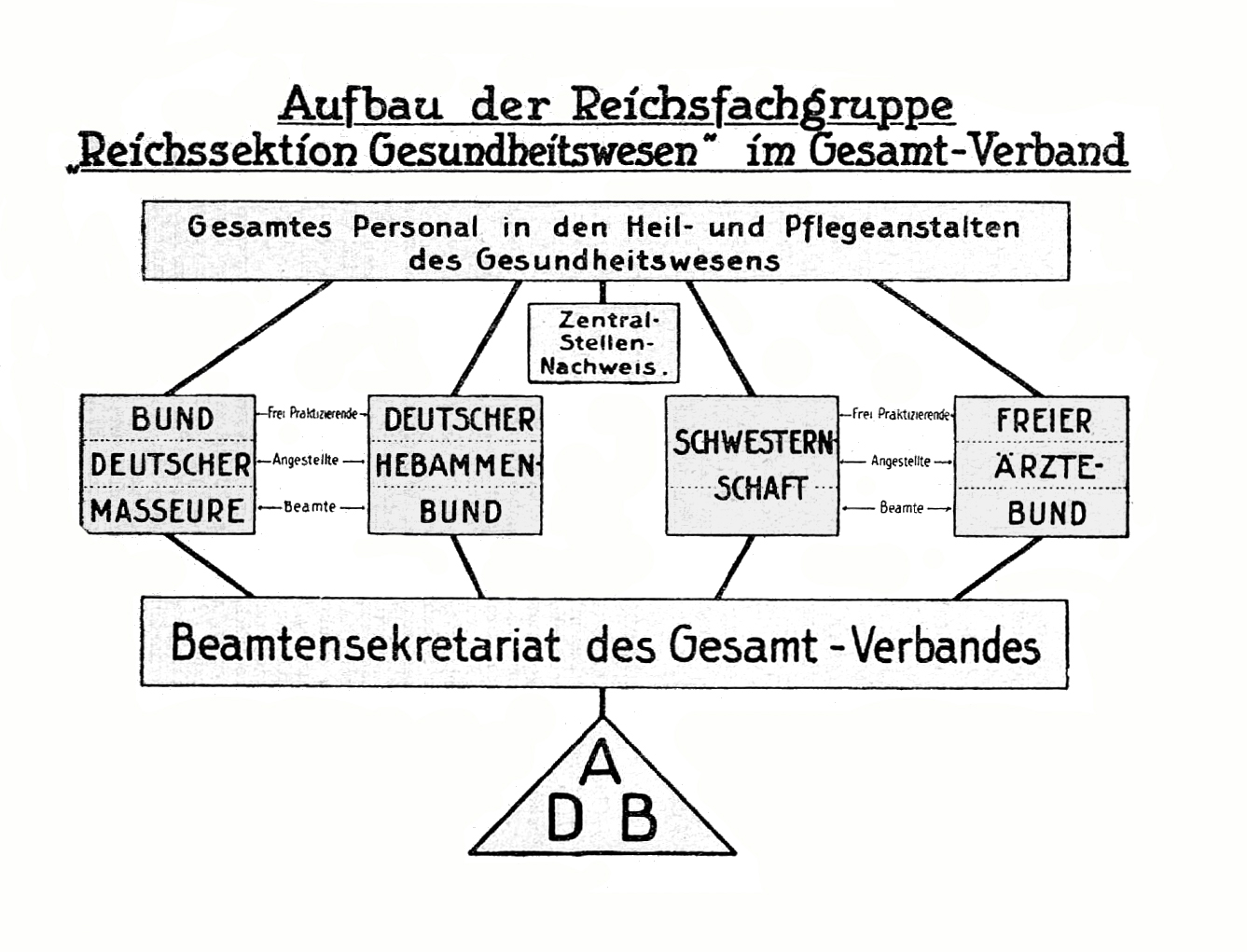 Aufbau der Reichsfachgruppe Reichssektion Gesundheitswesen im Gesamtverband der öffentlichen Betriebe und des Personen- und Warenverkehrs.